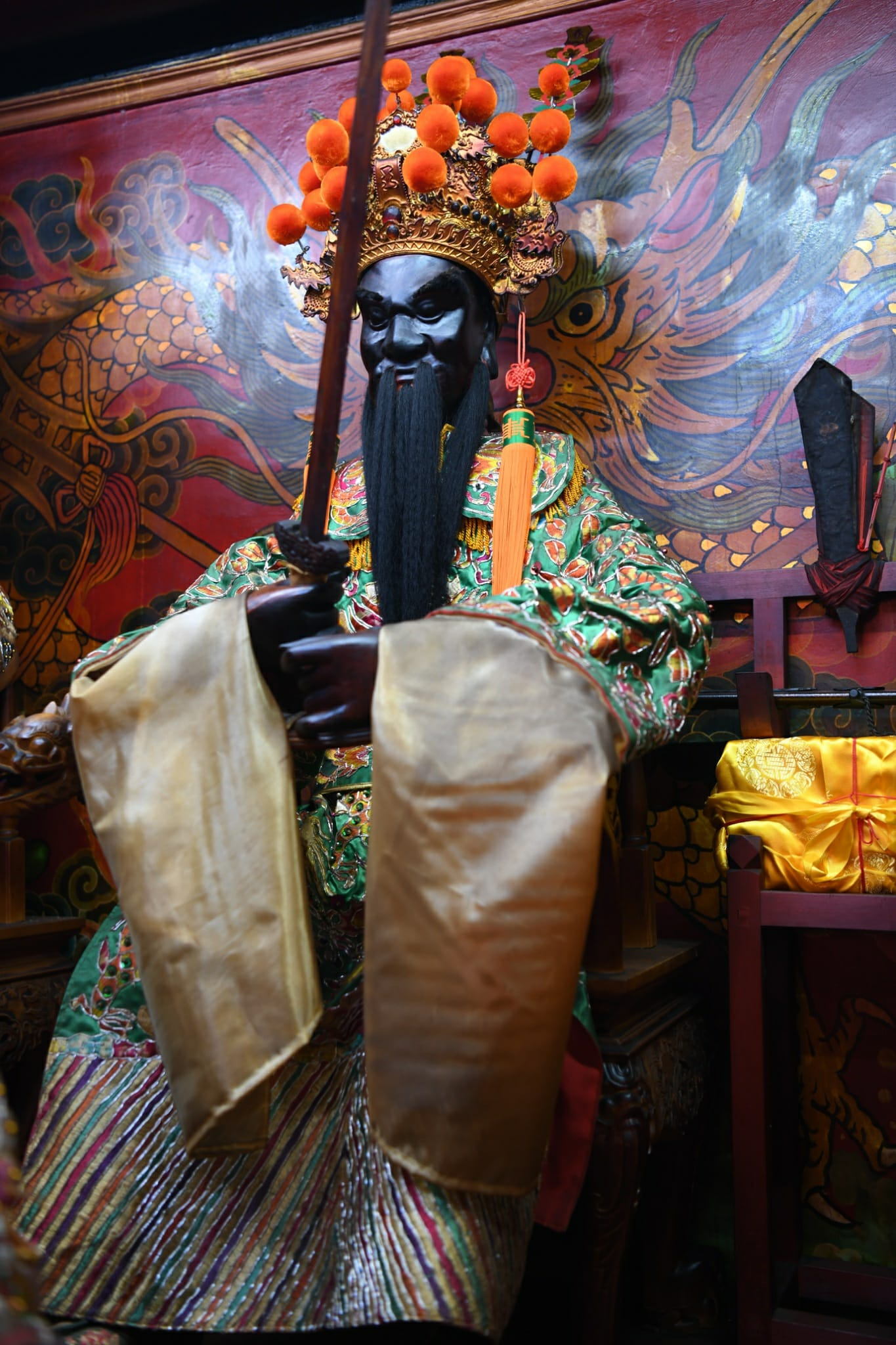 臺南三山國王廟 鎮殿獨山國王，為大型軟身神像。